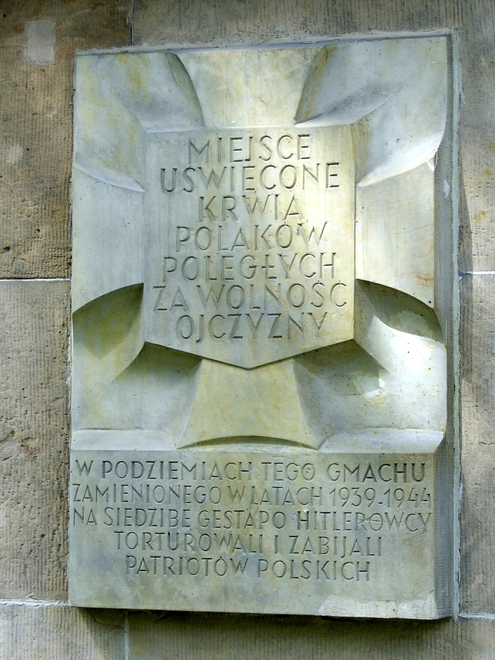 Tablica pamiątkowa przed Mauzoleum Walki i Męczeństwa przy al. Szucha 25 w Warszawie (proj. Karol Tchorek, 1949)